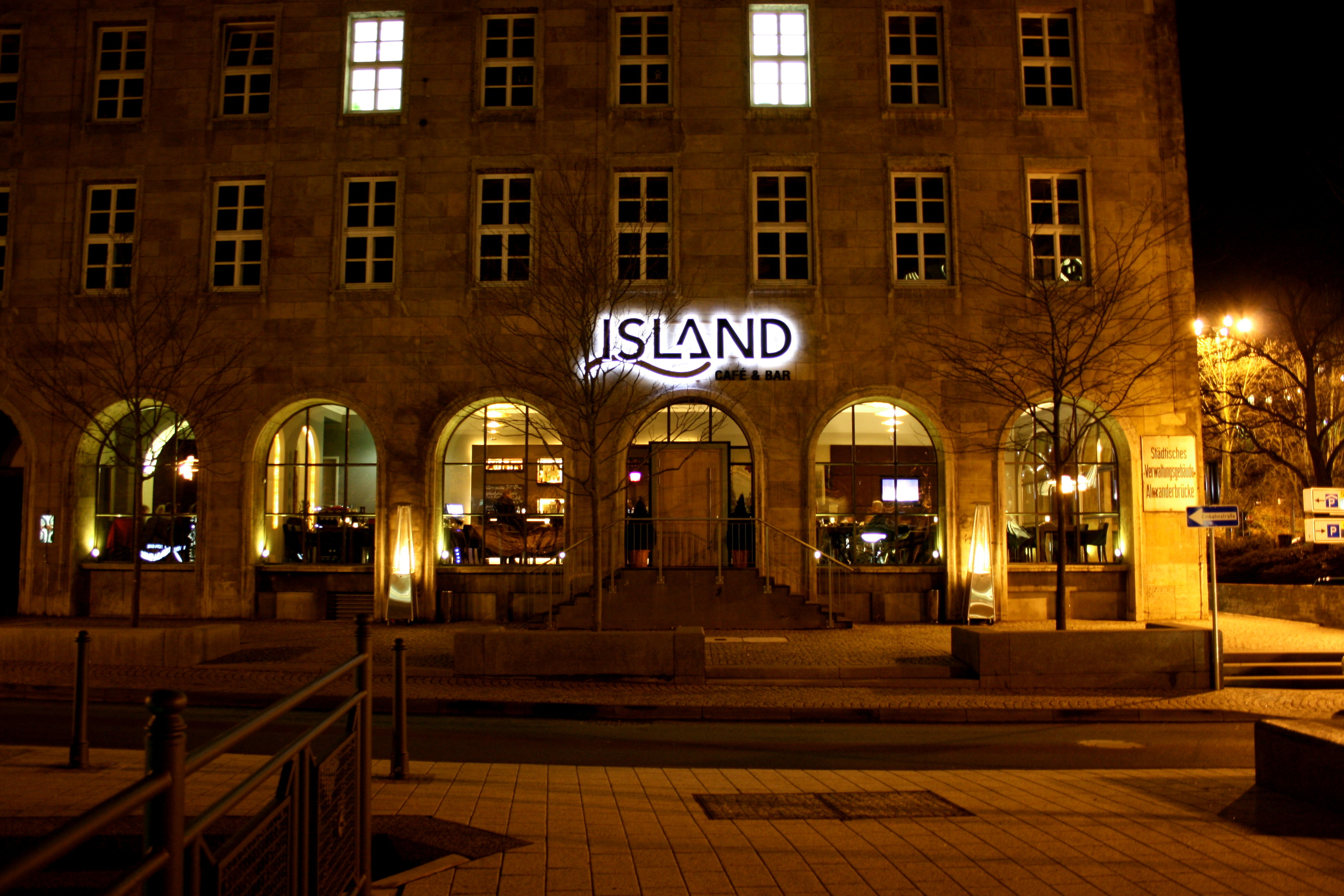 Städtisches Verwaltungsgebäude Alexanderbrücke in Wuppertal